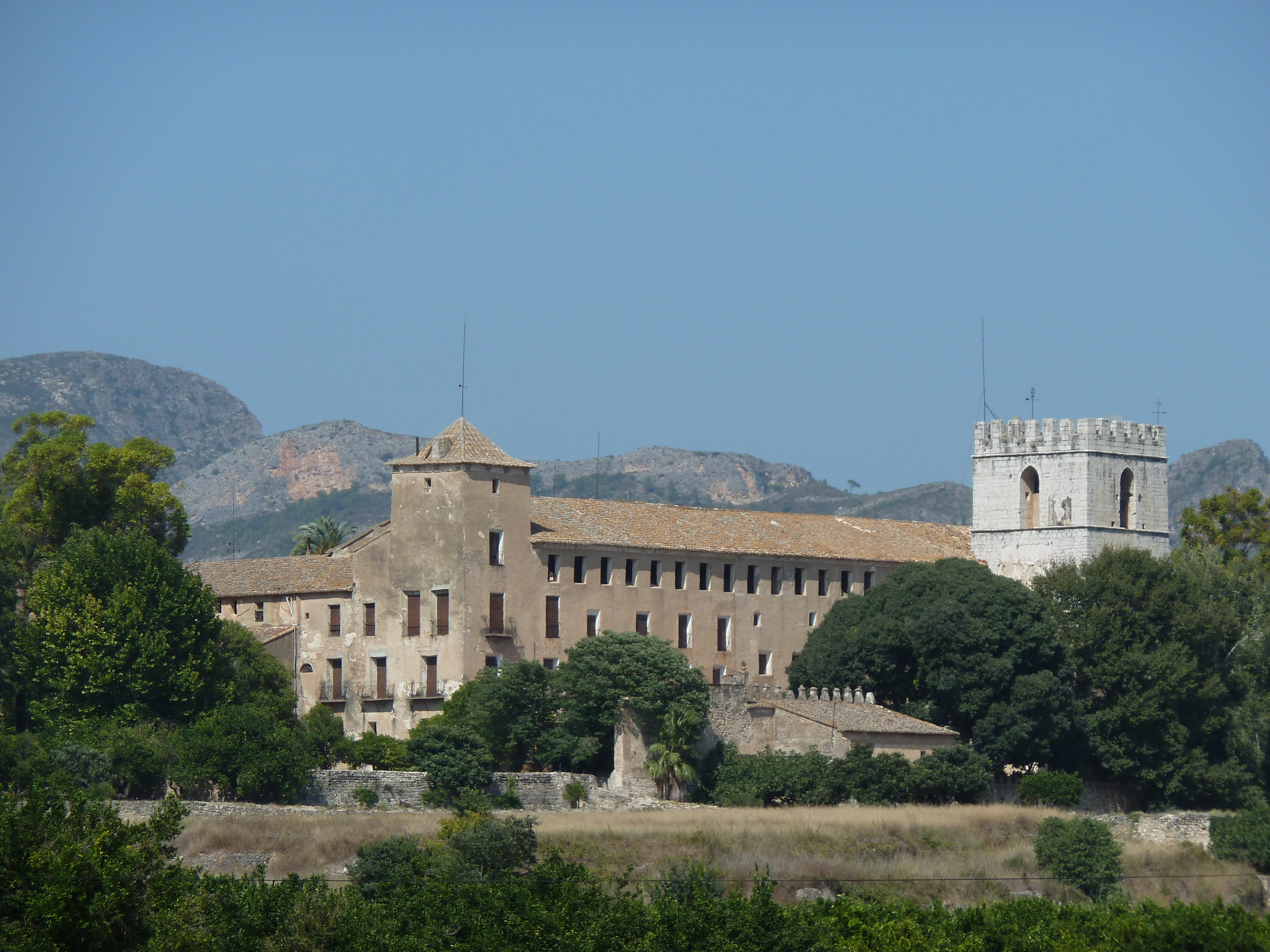 Convent o Monestir de Sant Jeroni de Cotalba. La Safor. País Valencia